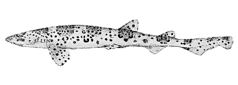 Бразильская кошачья акула (Scyliorhinus haeckelii)